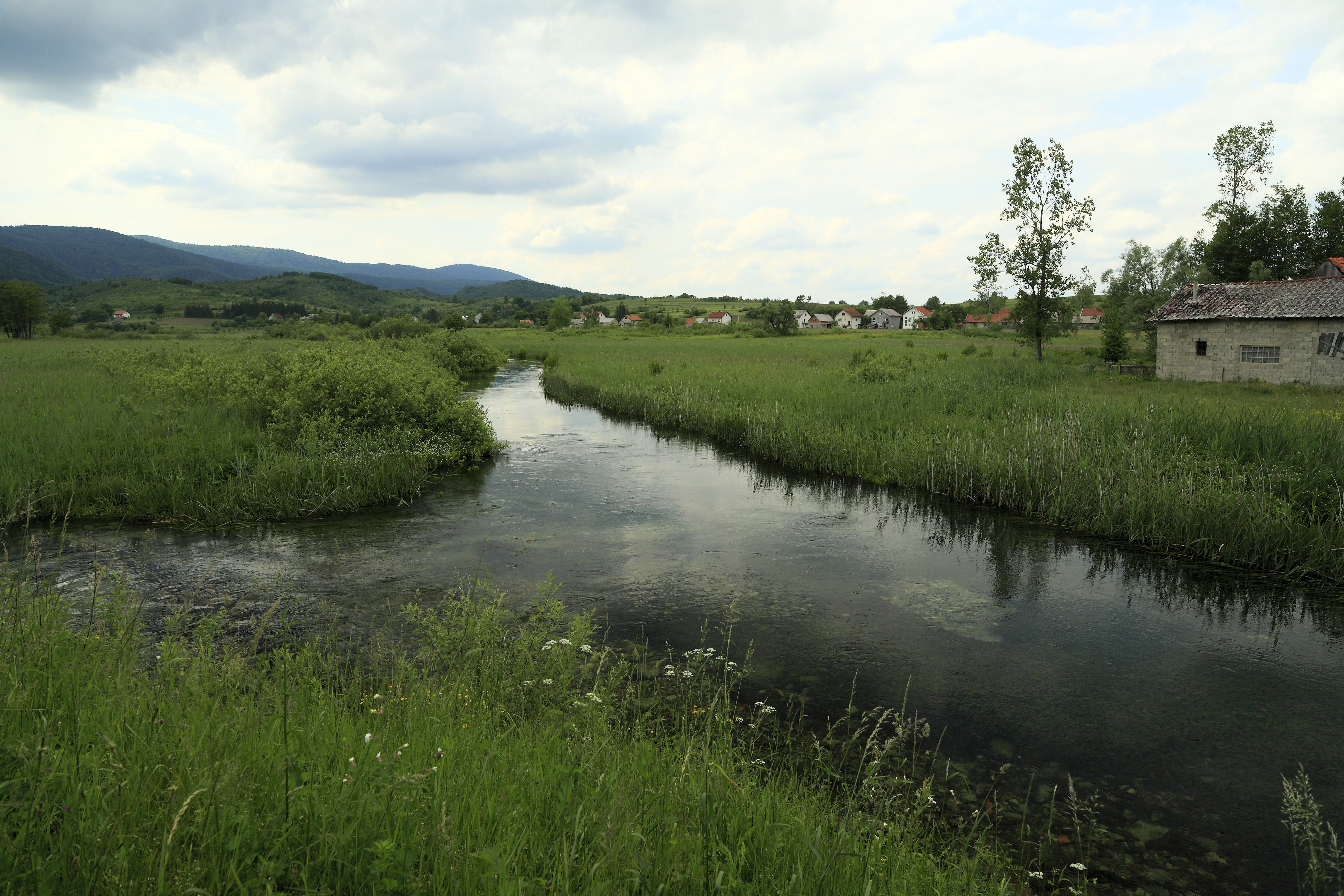 Stromauf Richtung Westen von der Brücke der D42 nördlich von Plaški. Die hier aufgestaute Dretulja ist ein Karstfluss, der knapp zwei Kilometer westlich von Plaški in einem Quellteich entspringt und ebenfalls zwei Kilometer östlich von Plaški wieder versickert.